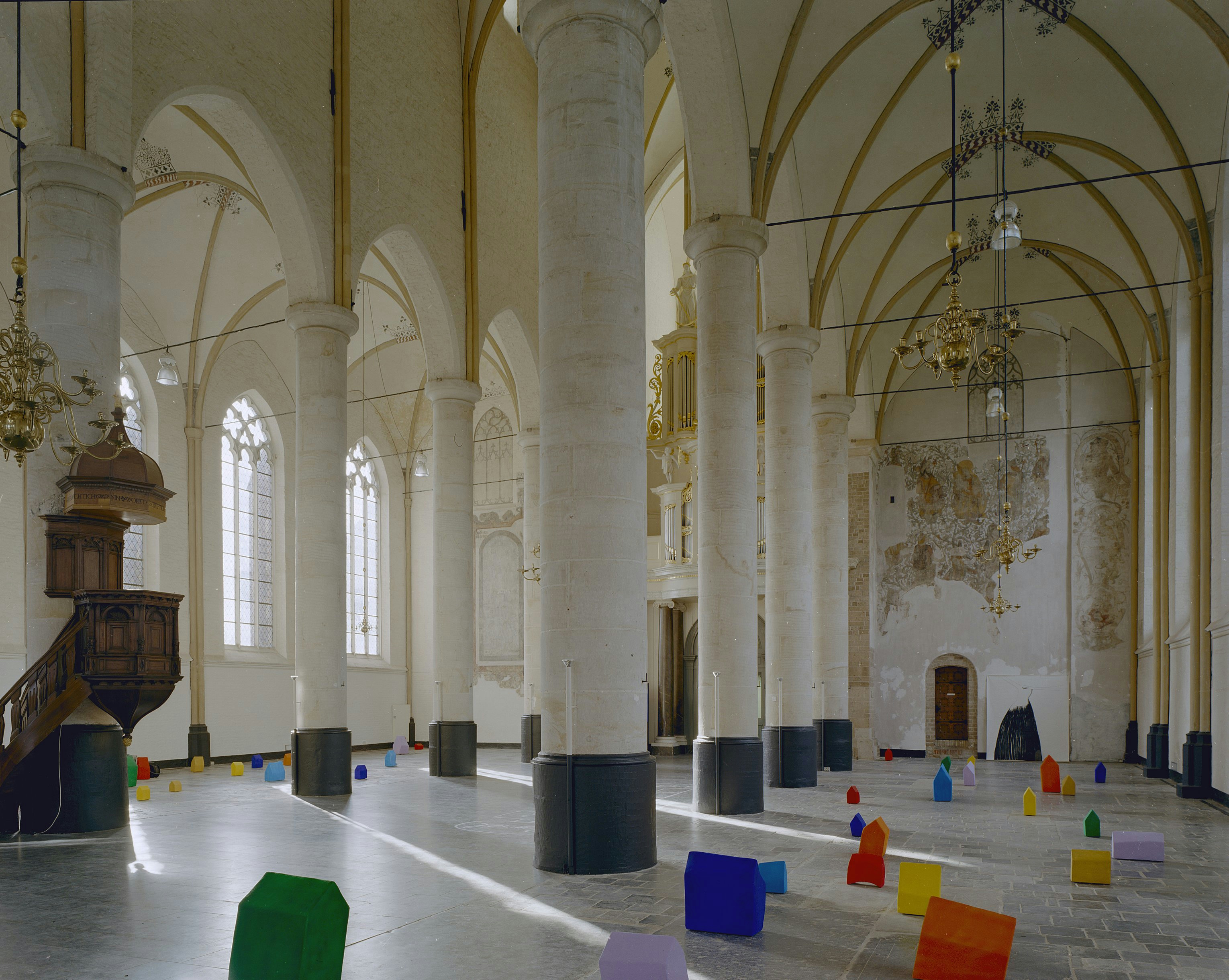 Bergkerk: Interieur, overzicht van het noordoosten naar het zuidwesten